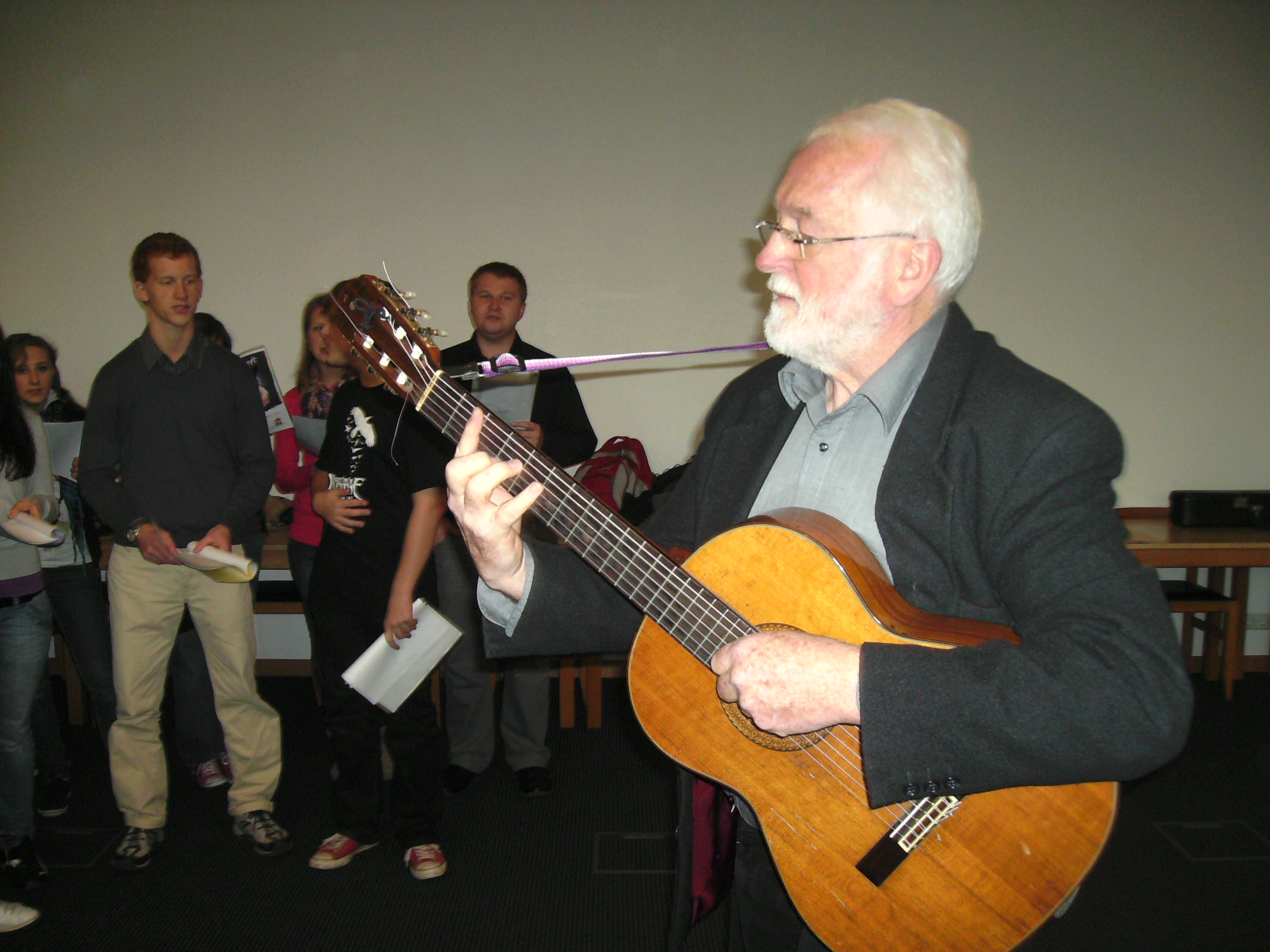 Hans Bollinger (Pädagoge) als Musiker